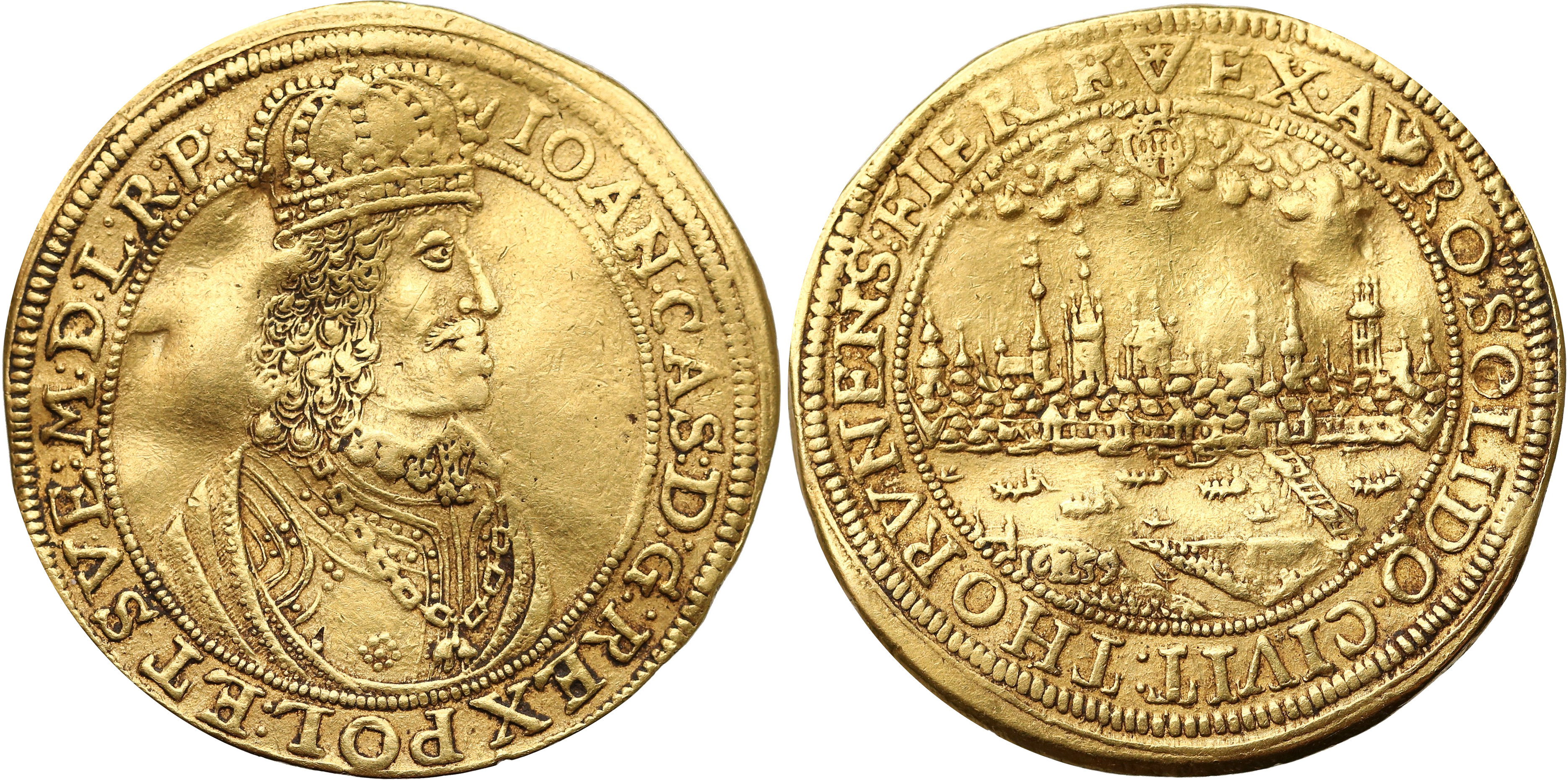 6 dukatów miejskich Toruń 1659